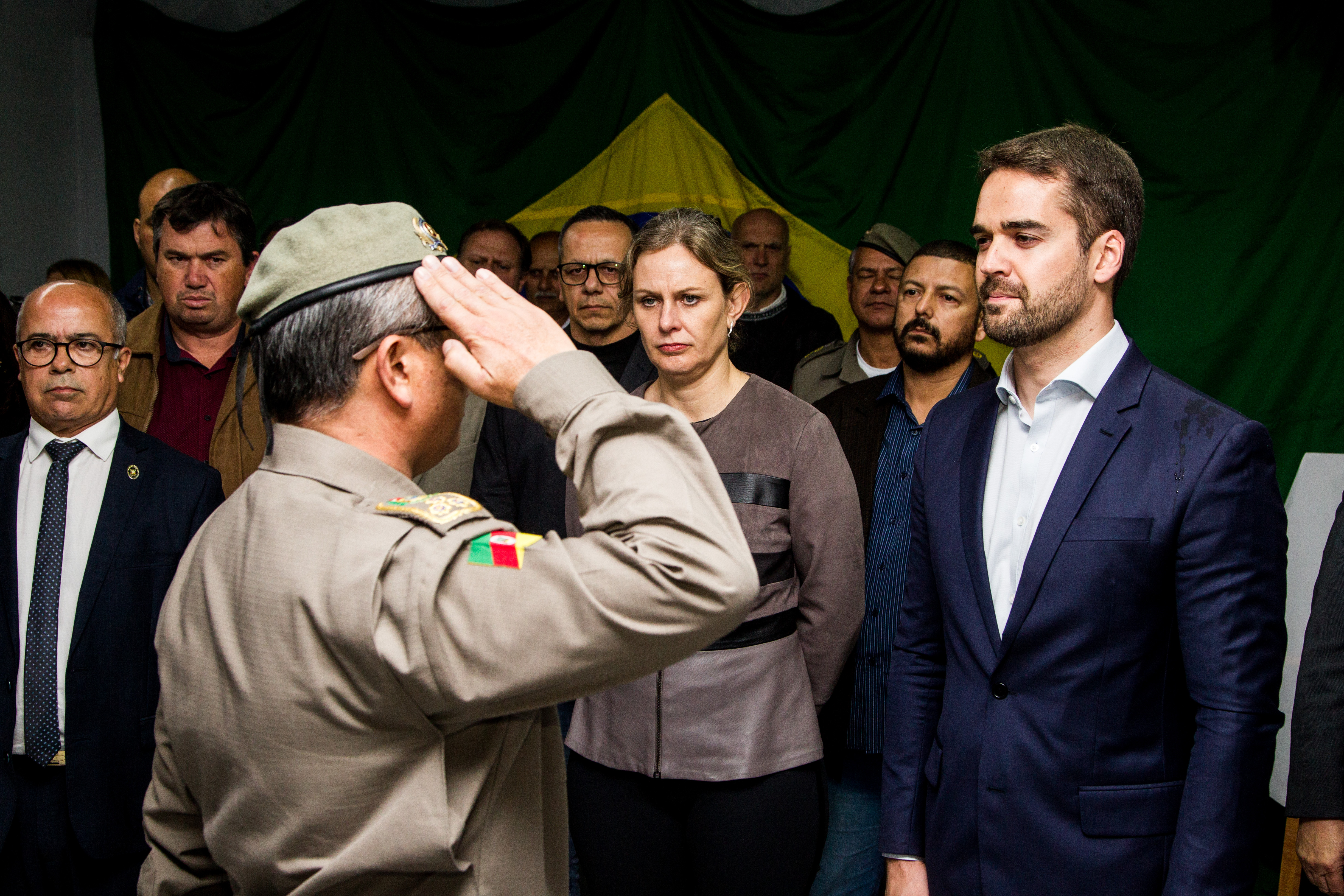 Eduardo Leite e Paula Mascarenhas durante o evento de inauguração do BP Choque.